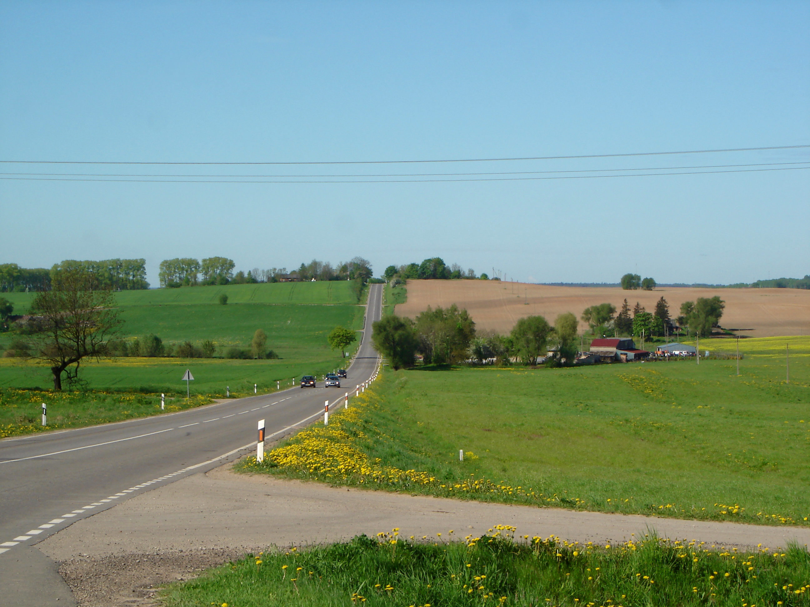 Litauen: Europastraße 77 (A12) zwischen Tauragė und der Grenze zur Russischen Föderation